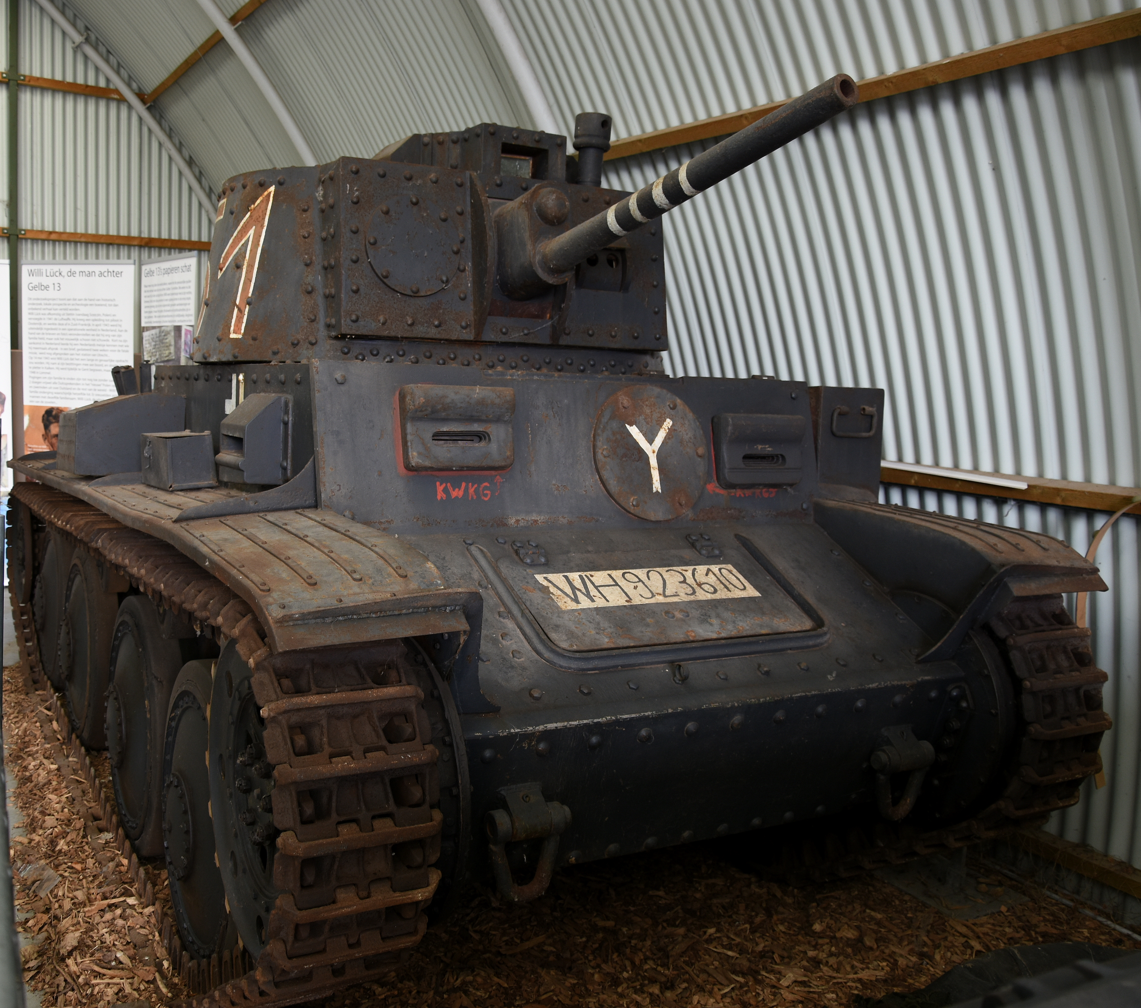 Praga 38T - Panzerkampfwagen 38(t) For Freedom Museum, Knokke-Heist